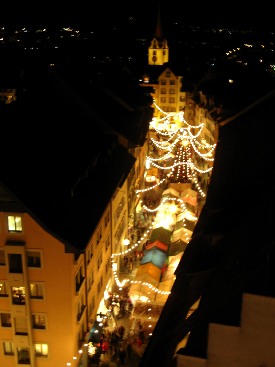 Christchindlimärt 2007 in Bremgarten, vom Spittelturm aus gesehen